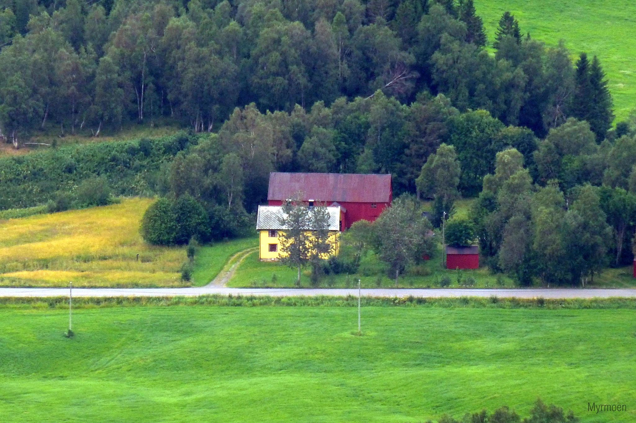 En av gårdene på Myrmo i Vefsn